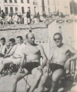 Die beiden Angehörigen der französischen Resistance Léon Georges Marie Joseph Noël (1917), links und Sam Kadyss am Strand der Croisette in Cannes.